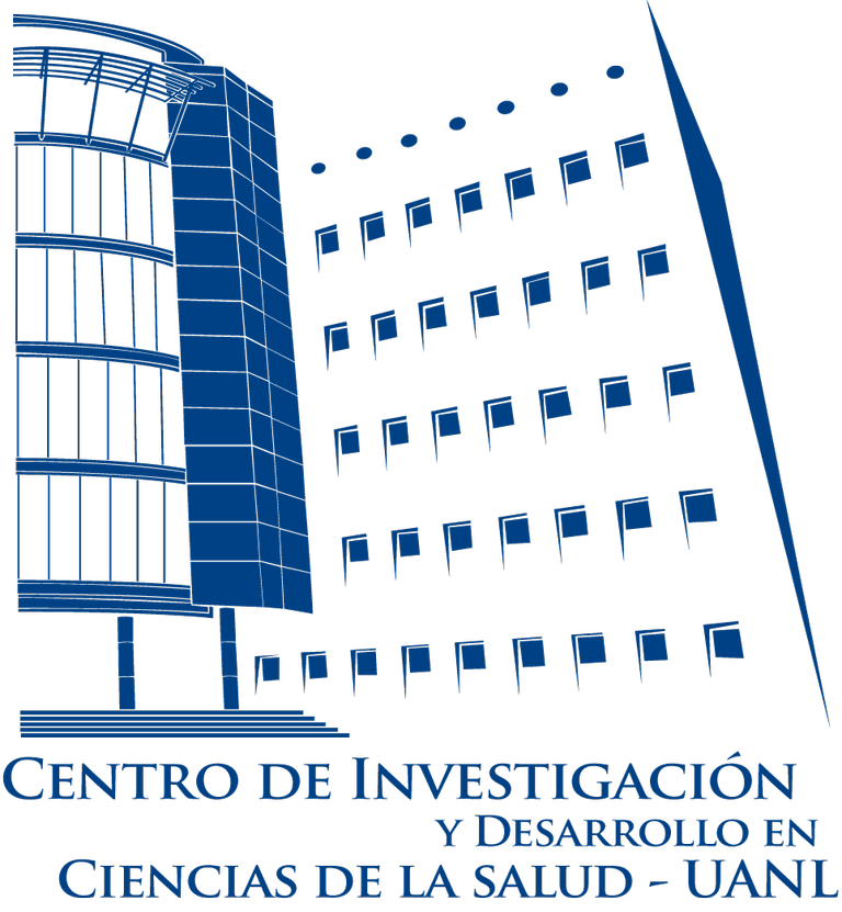 Logo del Centro de Investigación y Desarrollo en Ciencias de la Salud. El estado de Nuevo León